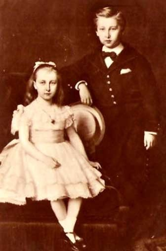 Prince Baudouin et princesse Henriette (qui deviendra duchesse de Vendôme) de Belgique, enfants du prince Philippe, comte de Flandre et de la princesse Marie de Hohenzoller.